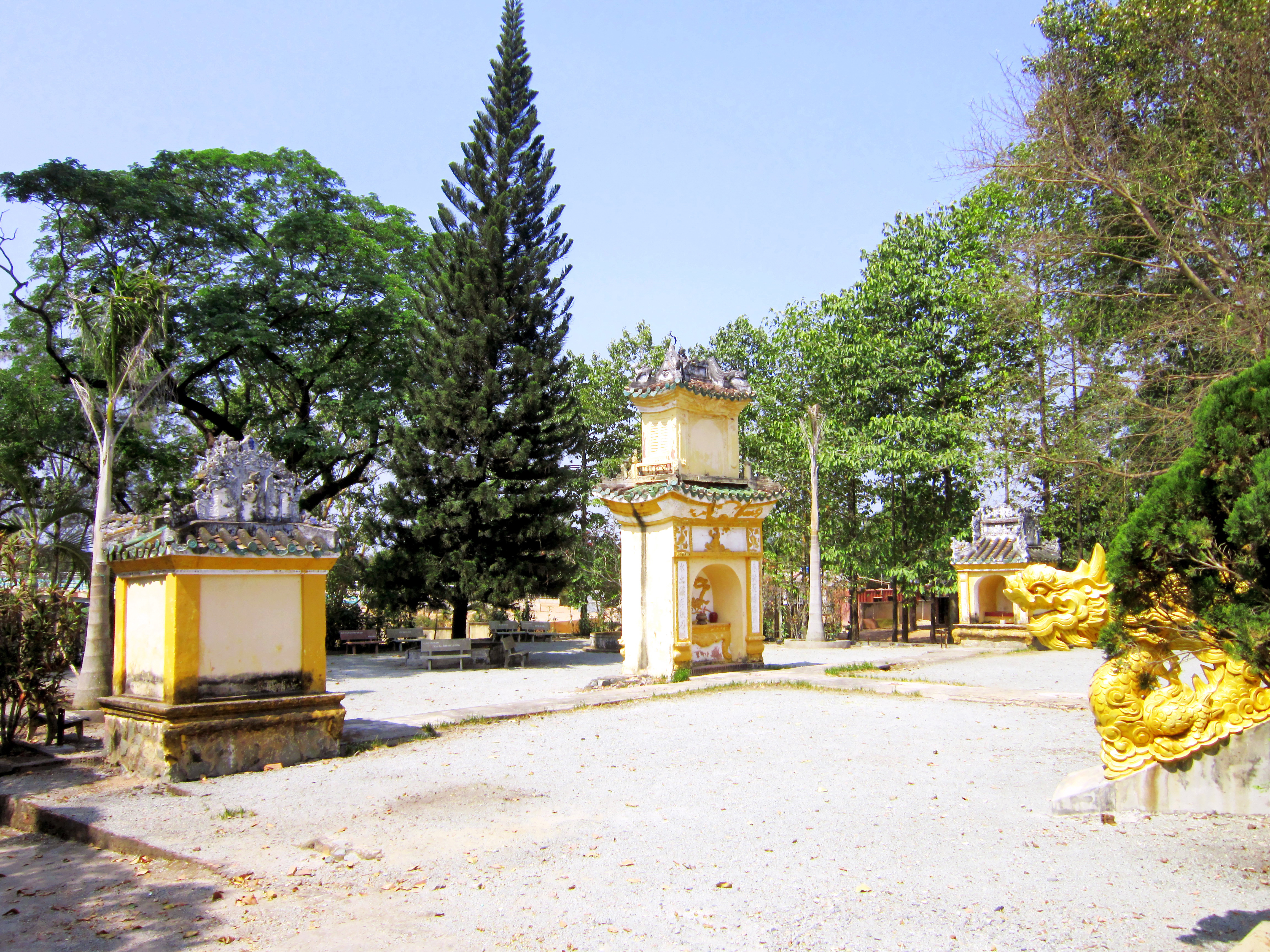 Sân đình Phú Cường, tục gọi là đình Bà Lụa (từ đông lang của ngôi đình nhìn ra), hiện tọa lạc ở phường Phú Thọ, thành phốThủ Dầu Một, tỉnh Bình Dương, Việt Nam.